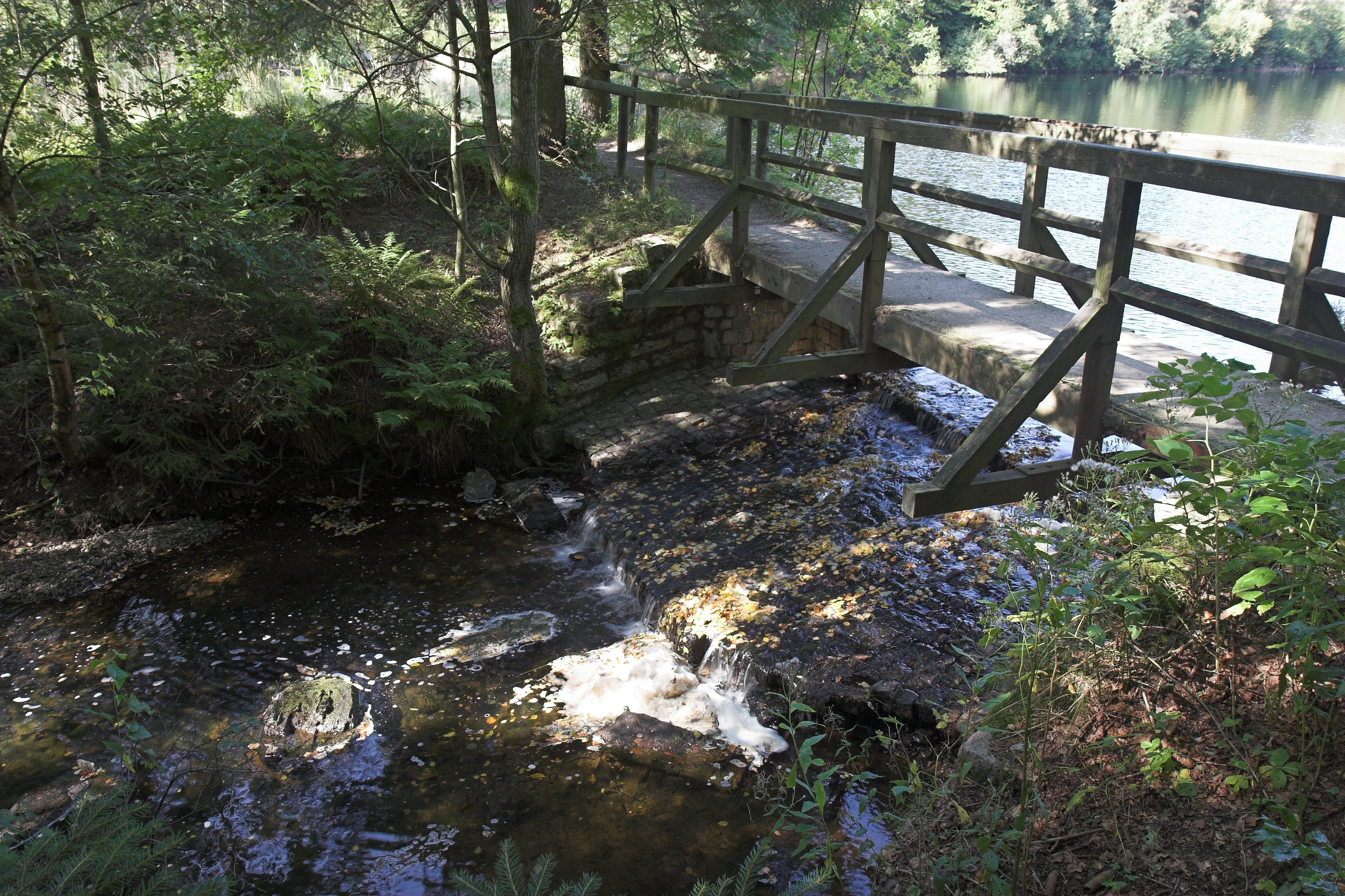 Der Ausfluss der Silberteichs in den Brunnenbach von der Bachseite